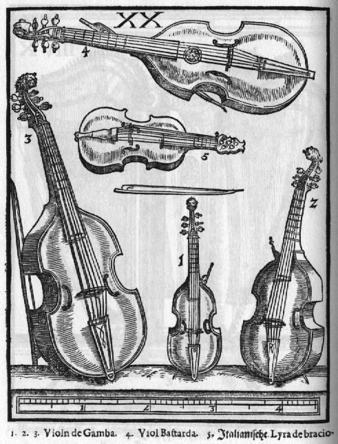 Various Viole da gamba/Viols